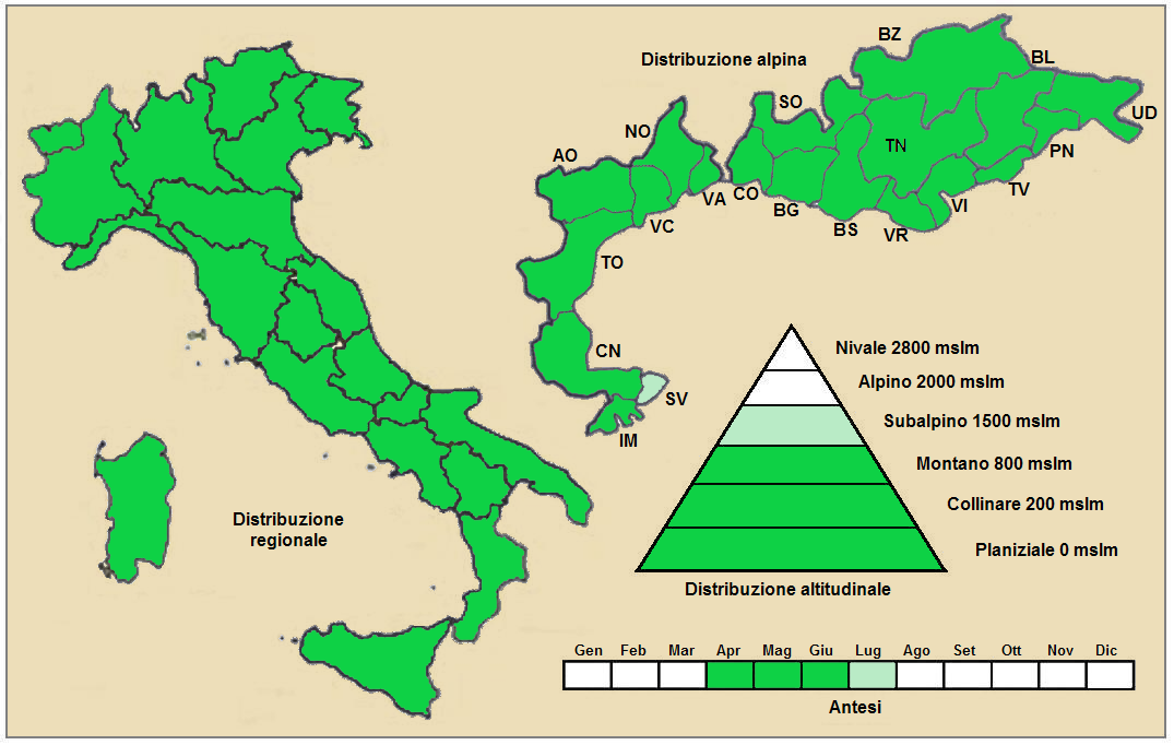 Forasacco rosso (Bromus sterilis) - Distribuzione in Italia